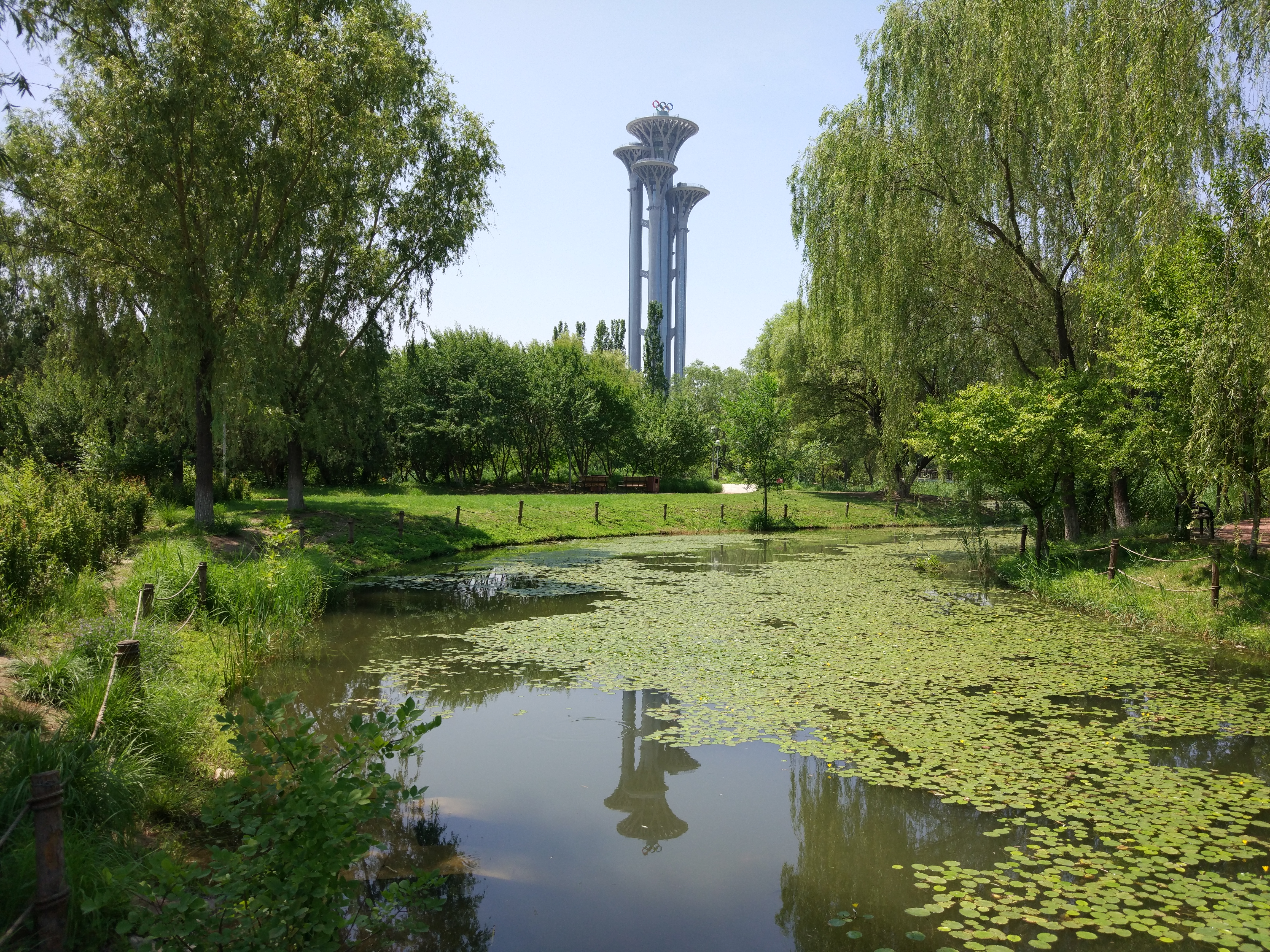 北京奥林匹克森林公园，远处是奥林匹克塔，摄于2016年6月